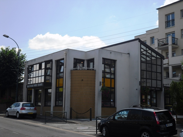 La bibliothèque Pierre Seghers d'Igny (91)